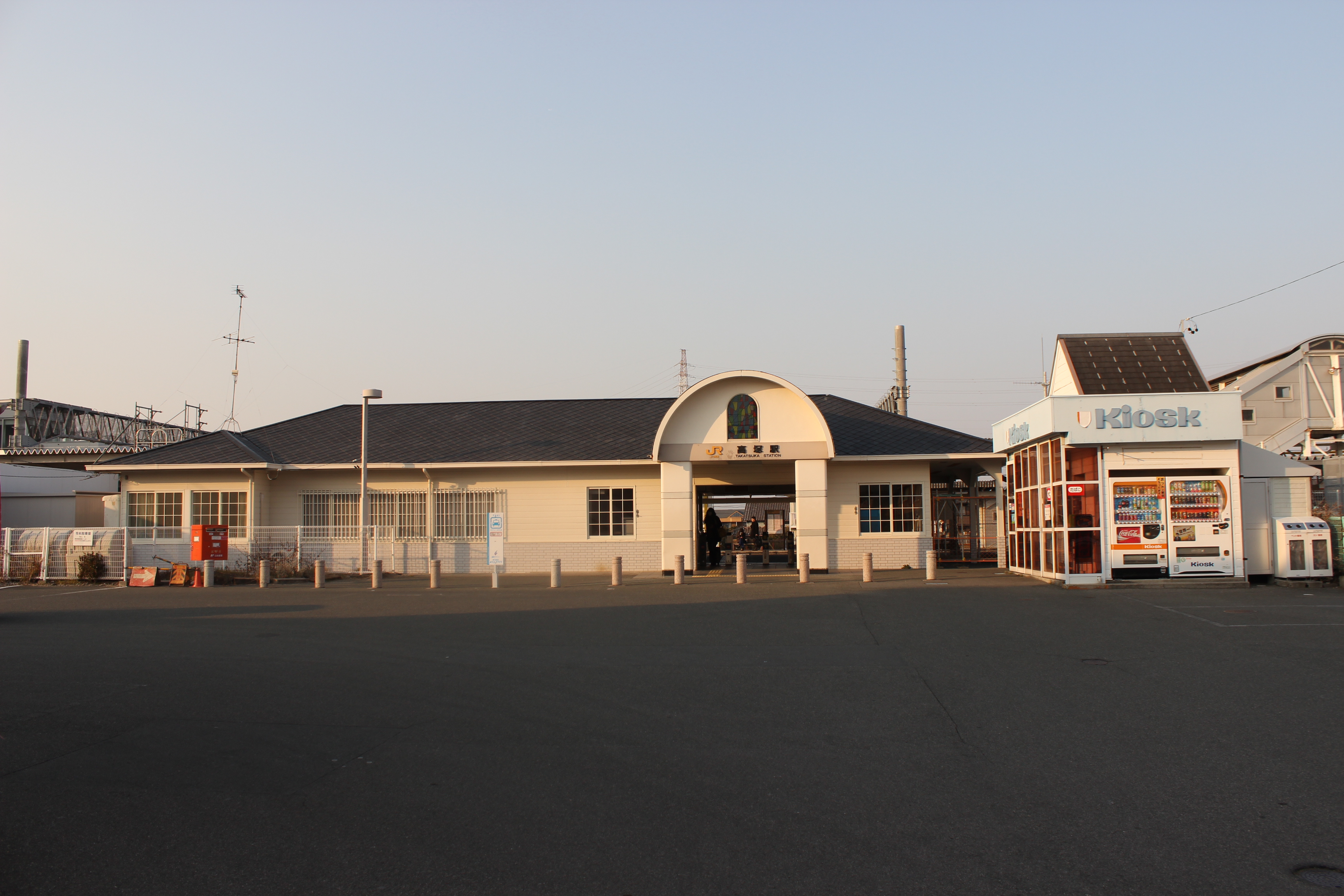 高塚駅旧駅舎